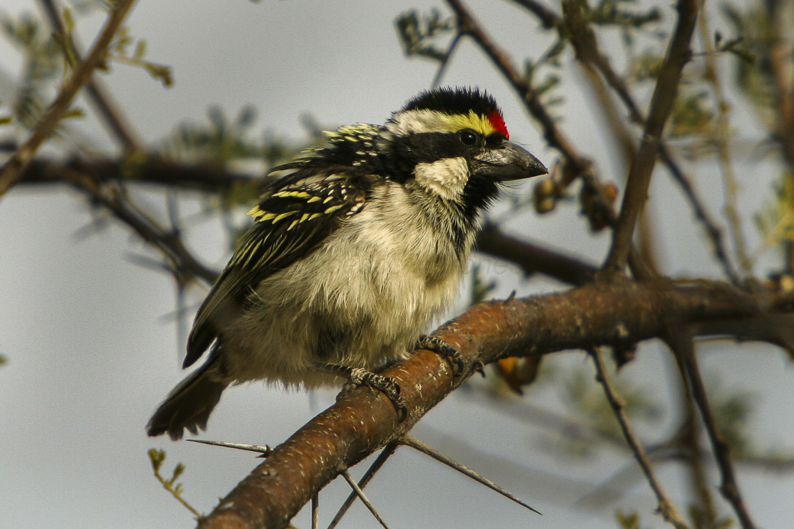 Pied Barbet - Etosha 0012